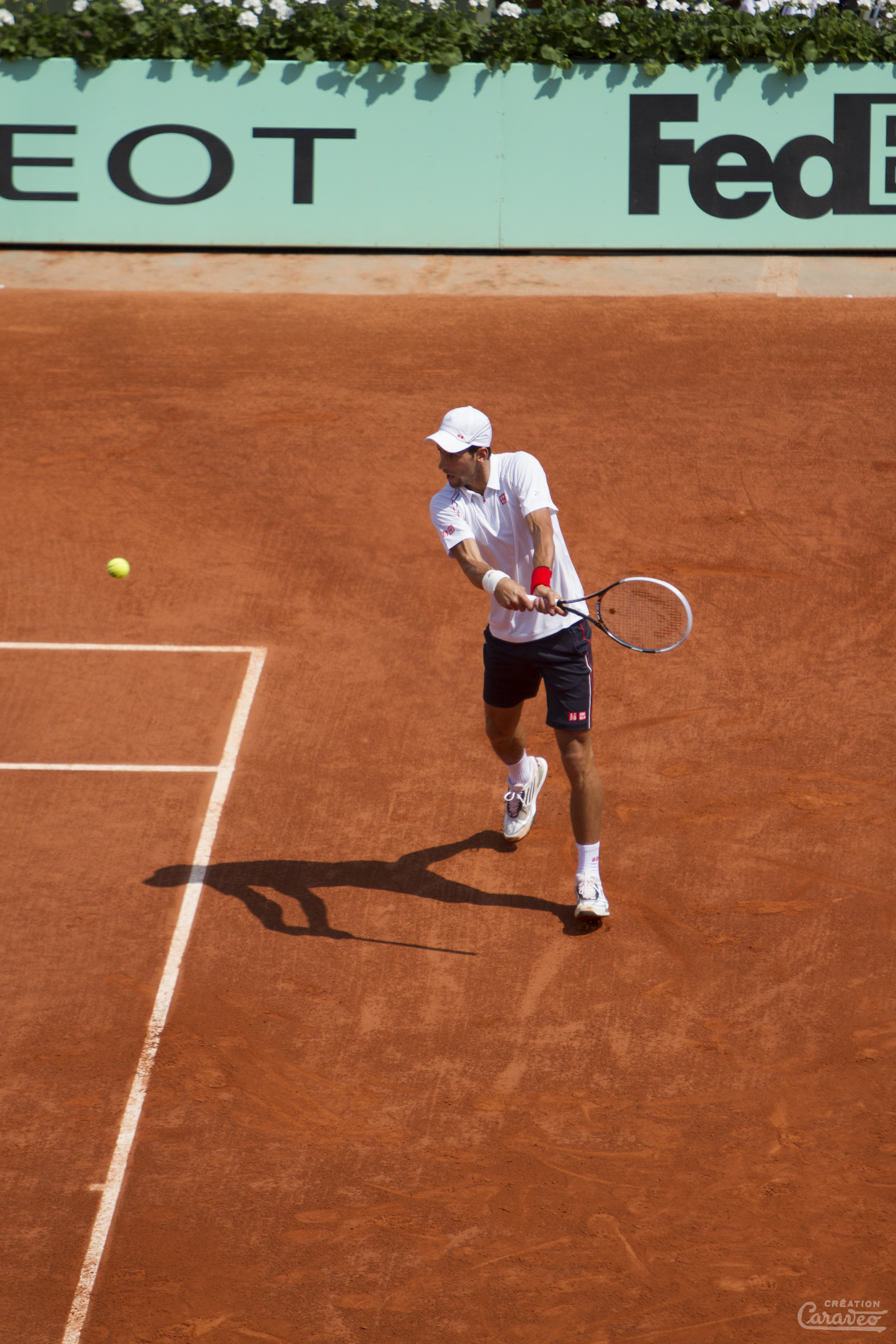 Novak Đoković, Roland-Garros 2012.